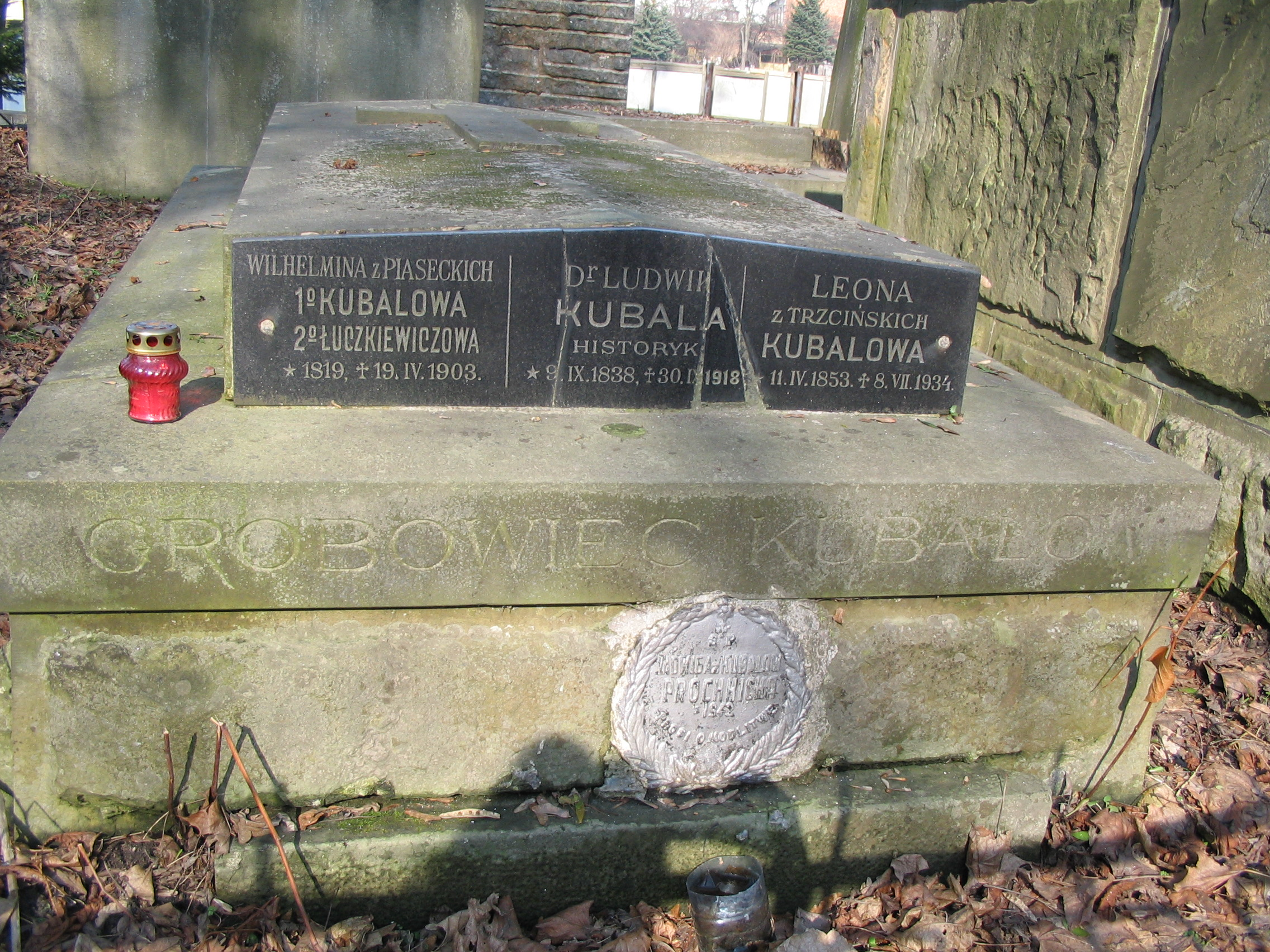 Grave of Ludwik Kubala on Lychakowski Cemetery in Lwow